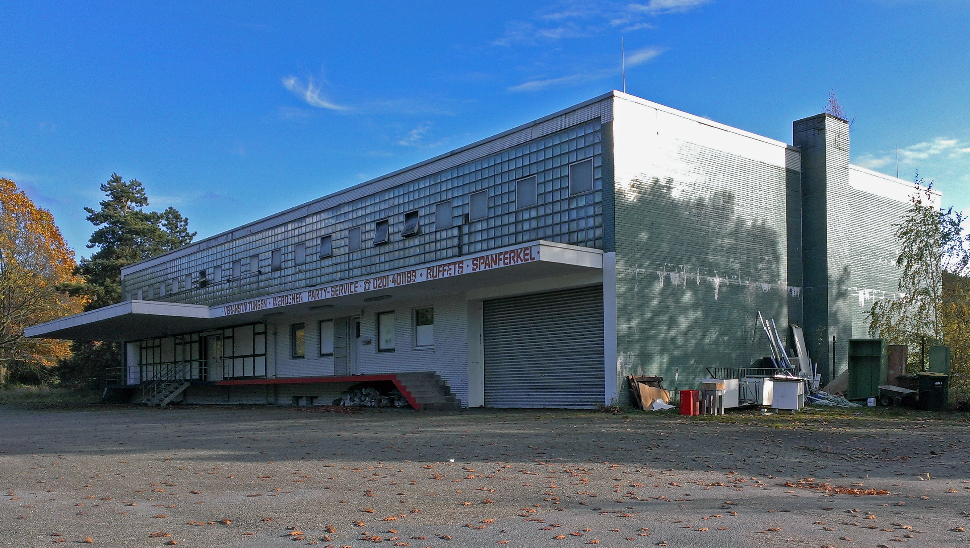 Gebäude des ehemaligen Kutel, Essen-Fischlaken